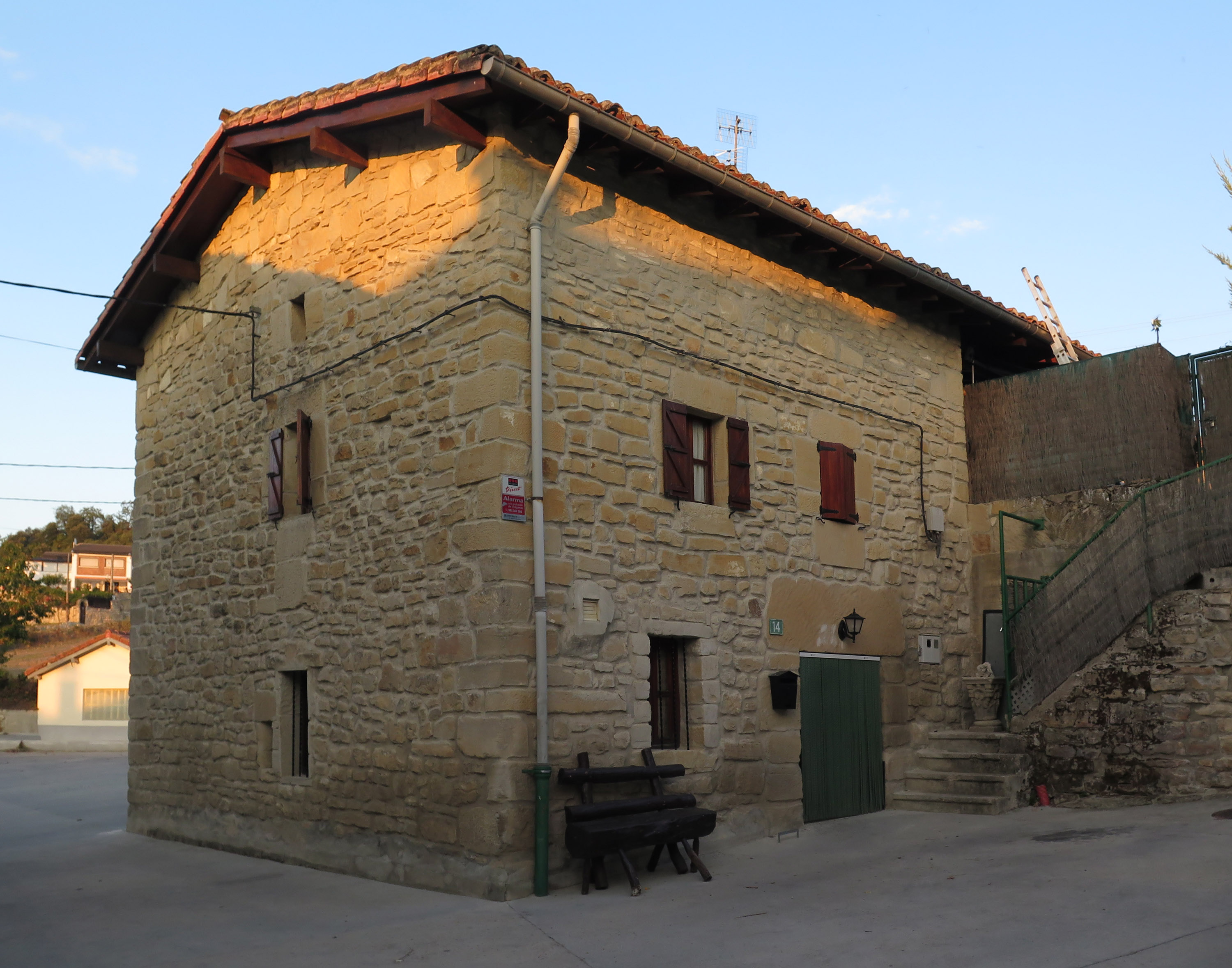 Casa del pueblo de Caicedo de Yuso, en la provincia de Álava (País Vasco, España)